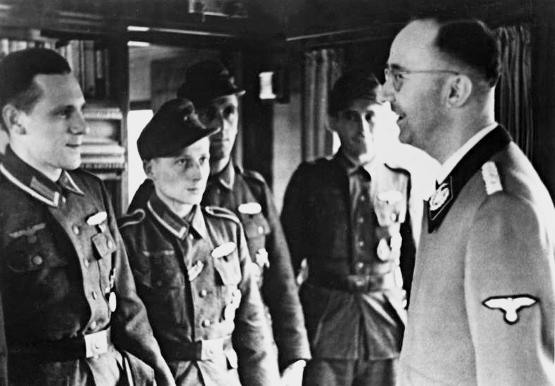 Himmler überreicht die Goldene Nahkampfspange Scherl Bilderdienst: Tapfere Nahkämpfer Der Reichsführer SS Himmler empfing Angehörige des Heeres und der Waffen-SS und überreichte ihnen die vom Führer verliehene Nahkampfspange in Gold. Von links nach rechts: Unteroffizier Heinz Rudolph, Unteroffizier Kray, Unteroffizier Adam Schaub und Obergefreiter Georg Felsner. Aufnahme: SS-PK Ege 27.10.44 [Herausgabedatum] Abgebildete Personen: Himmler, Heinrich: Reichsführer der SS, Deutschland (GND 11855123X)